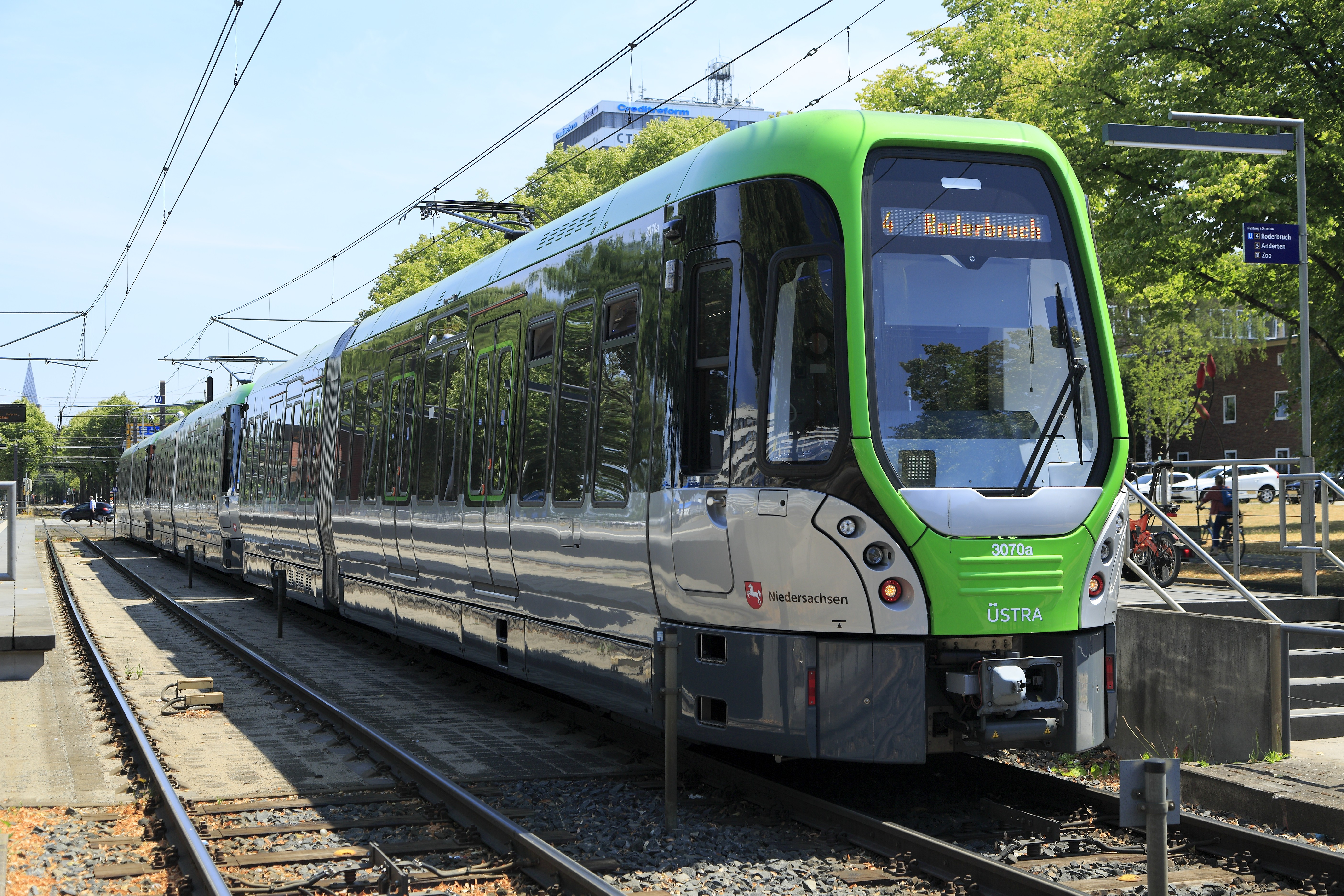 Dreiwagenzug aus Triebwagen der Reihe 3000, Linie 4 nach Roderbruch, Nachschuss. Die Wagen der Bauart 3000 bestehen aus nur zwei Wagenkästen mit drei Drehgestellen, der kürzere Kasten mit nur einem Drehgestell ist wie bei den »Leolinern« vom selben Hersteller auf dem längeren aufgesattelt. Klapptrittstufen gibt es nicht, die Wagen sind nur auf Strecken ohne tiefliegende Bahnsteige einsetzbar.